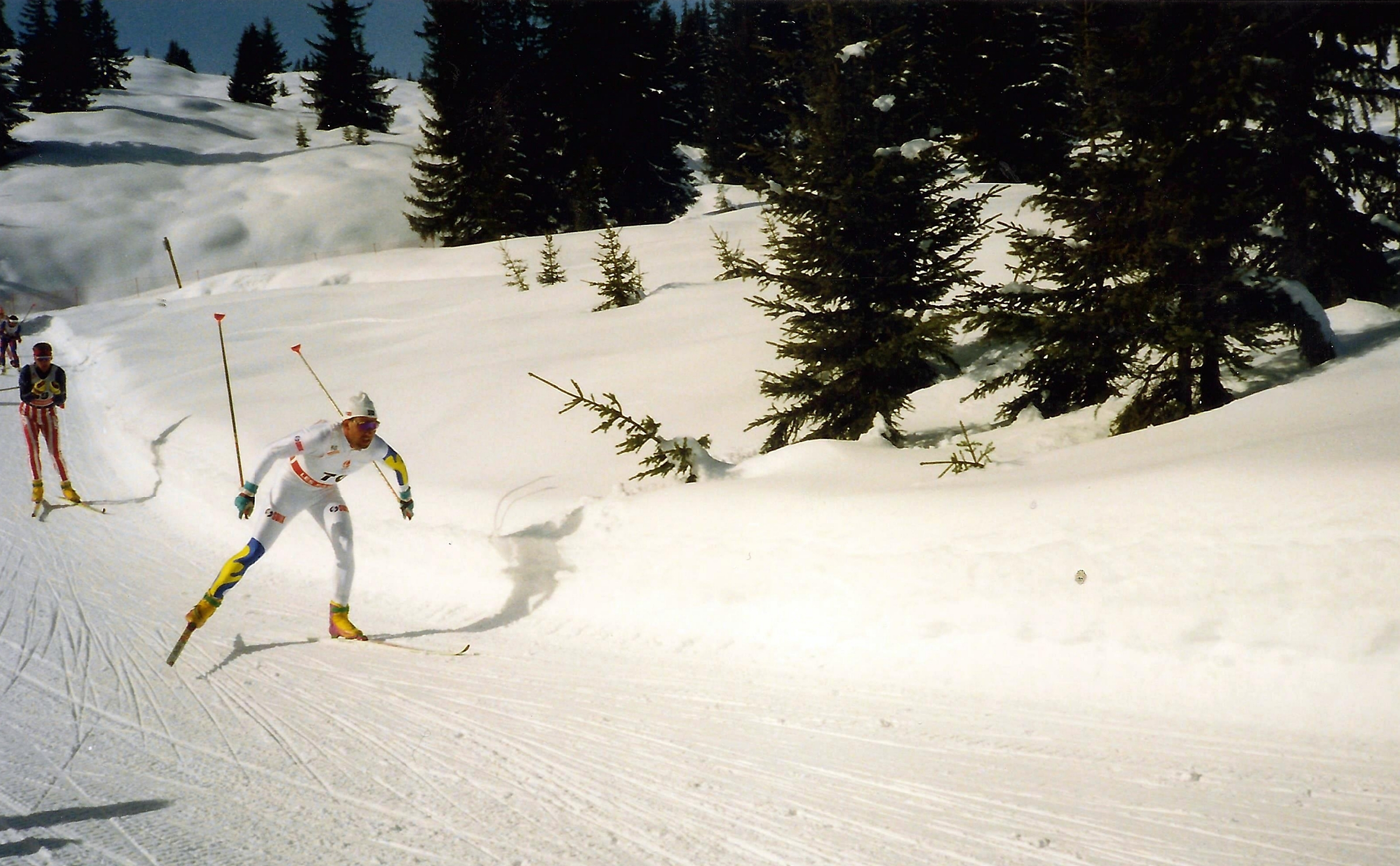 Torgny Mogren lors du 50 km hommes des J.O. d'Alberville, le 22 février 1992.